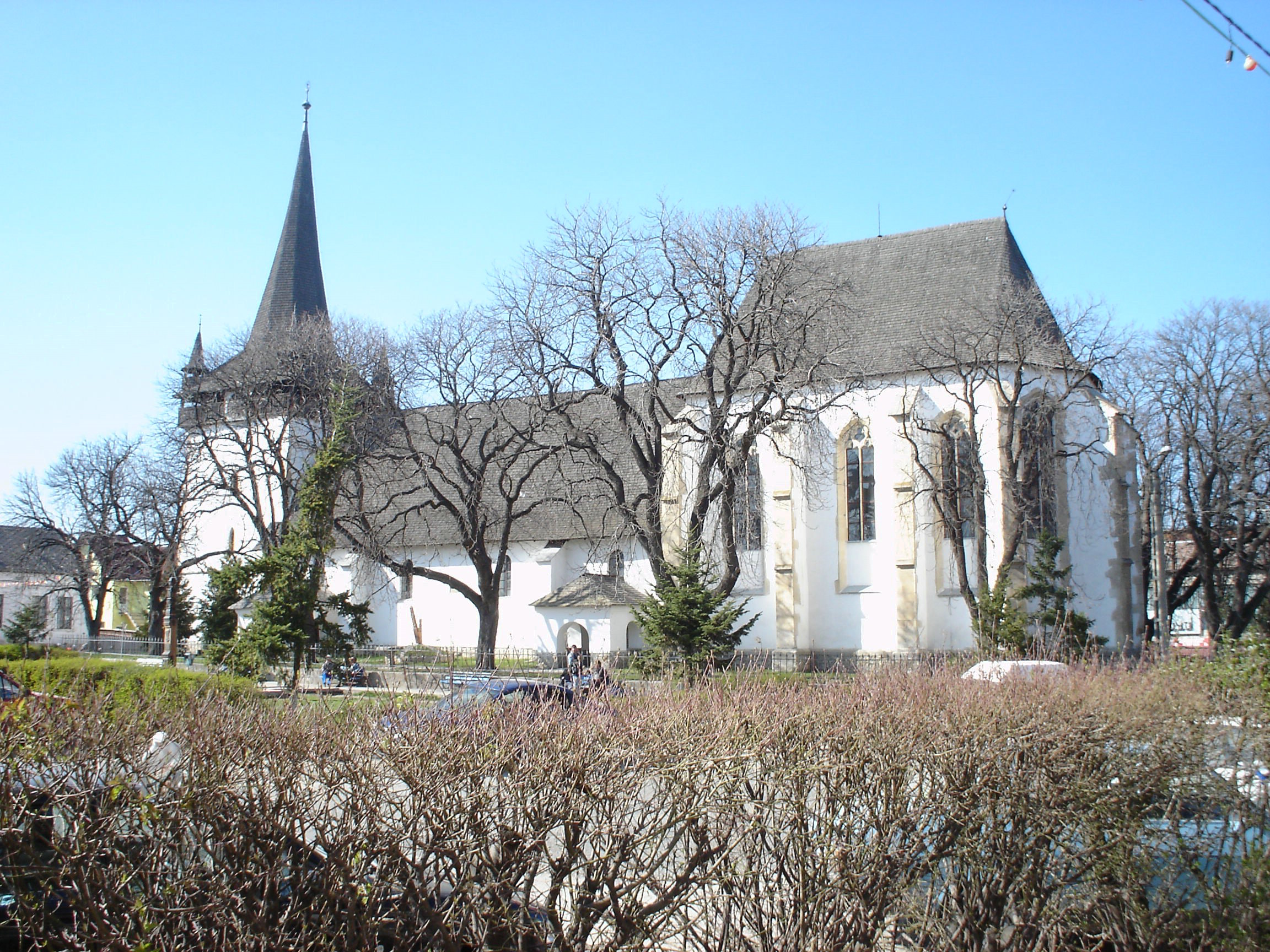 Bánffyhunyad református temploma